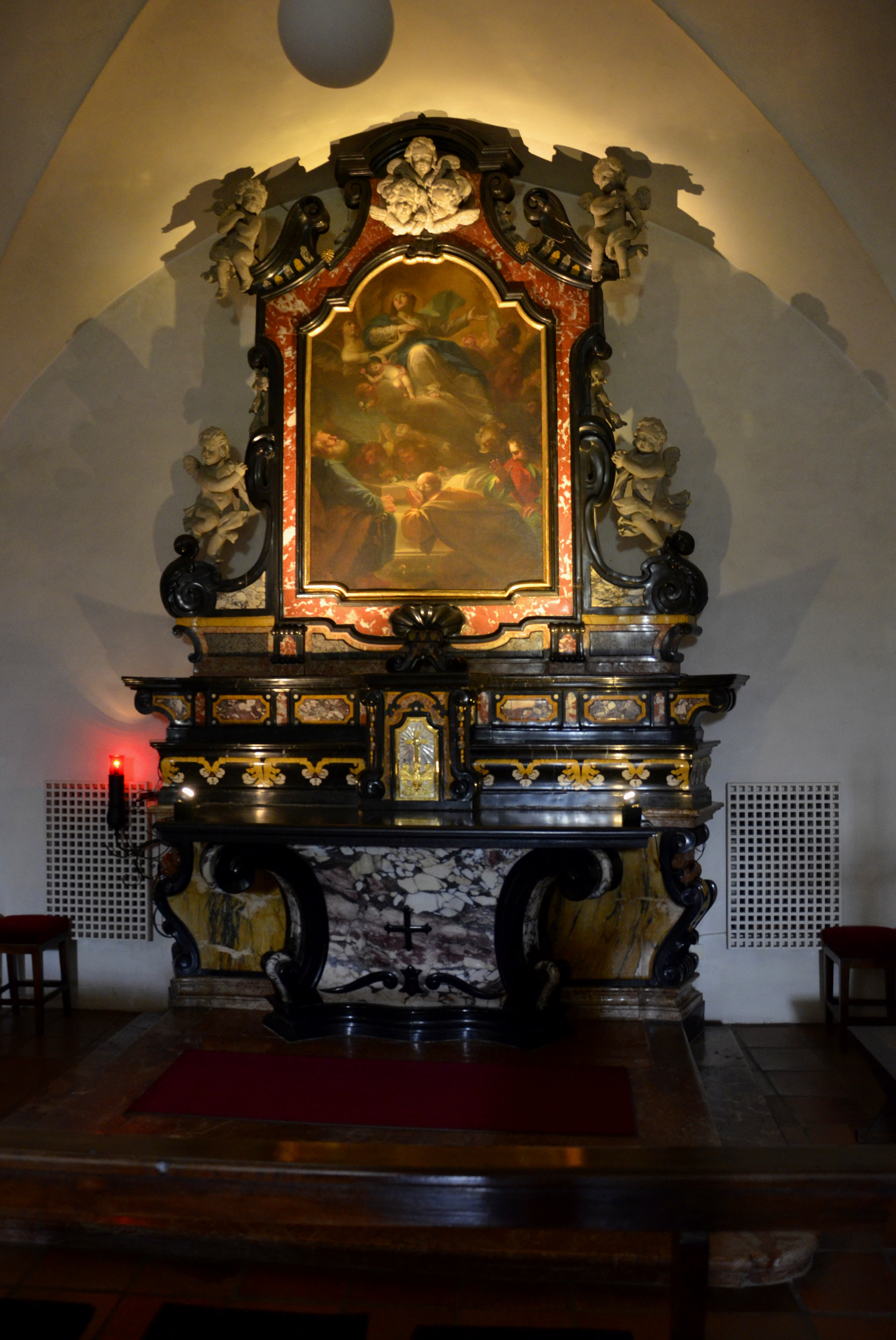 Chiesa parrocchiale di Santa Maria Assunta